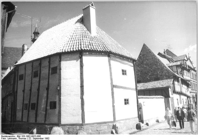 Quedlinburg, Wordgasse, Fachwerkhaus ADN-ZB Lehmann 22.9.82 Bez. Halle: Schöne DDR-Das älteste deutsche Fachwerkhaus, um 1400 erbaut, steht in Quedlinburg in der Wordgasse 3. Es birgt heute ein Museum für Fachwerk-Architektur in seinen Mauern. Bei diesem Hochständerbau geben Pfeiler, Säulen und Ständer dem Haus von der Grundschwelle bis zum Dach die notwendige Stütze. Eine Trennung von Haus- und Dachgefüge sowie eine äußere Trennung der Geschosse sind nicht vorhanden.